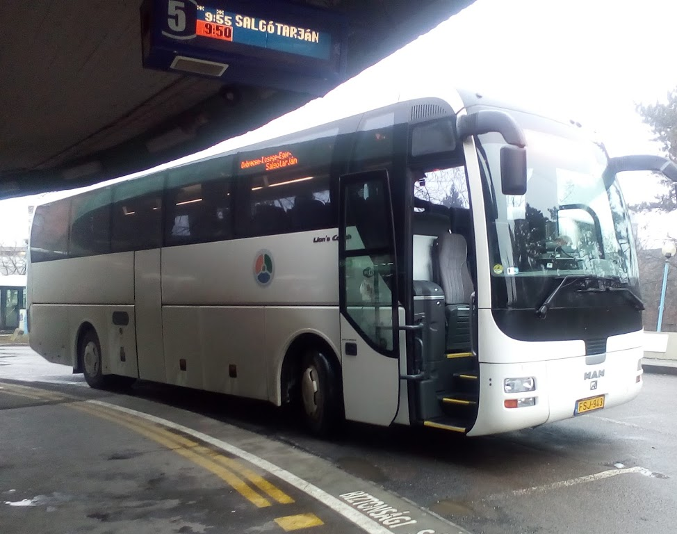 1447-es busz (MAN Lion's Coach), Eger